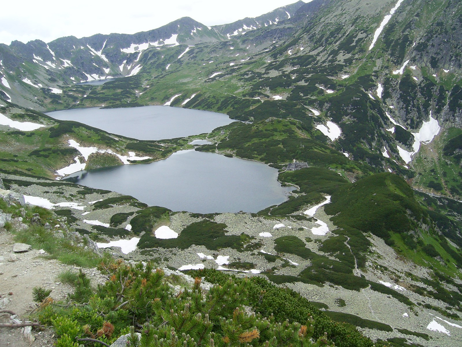 Widok na Dolinę Pięciu Stawów Polskich ze szlaku przez Świstówkę Roztocką